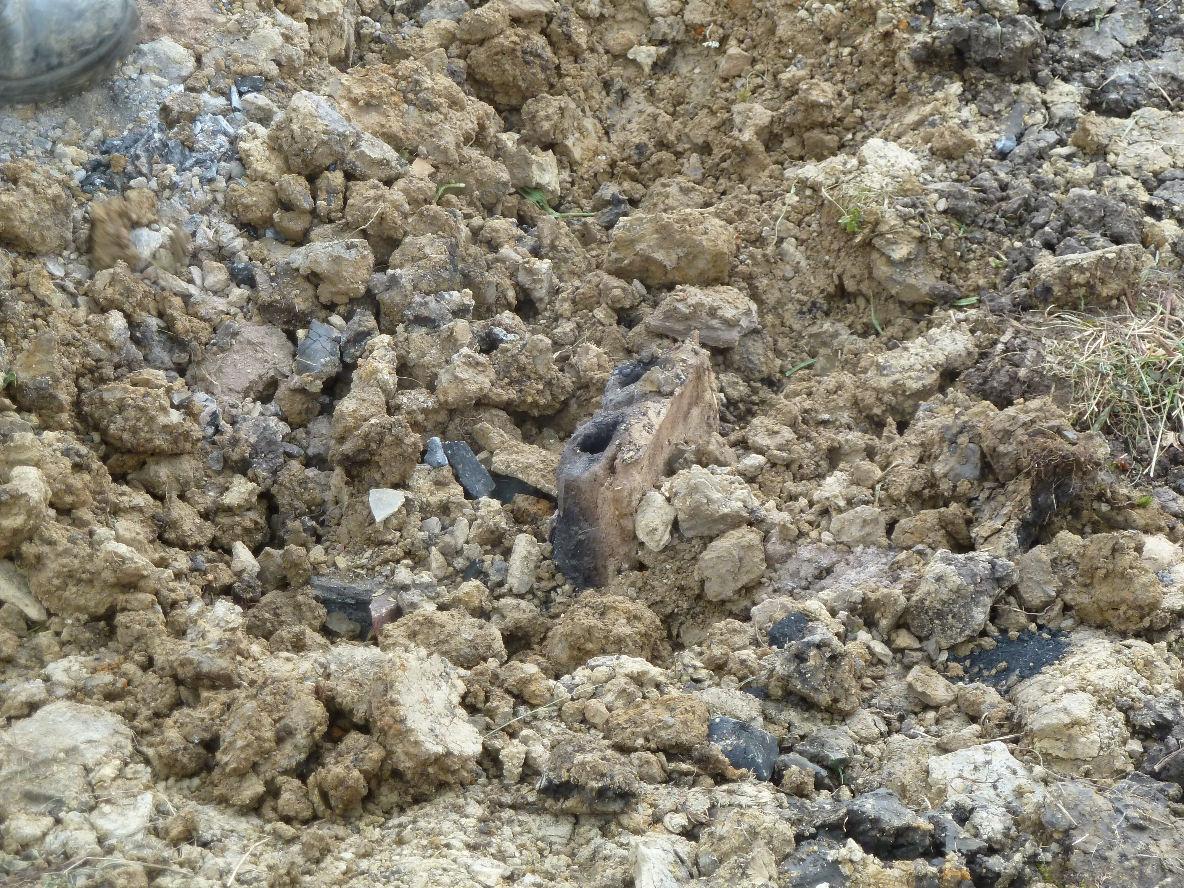 Glockenguss in Ewattingen mit Bruder Michael Reuter von der Abtei Maria Laach